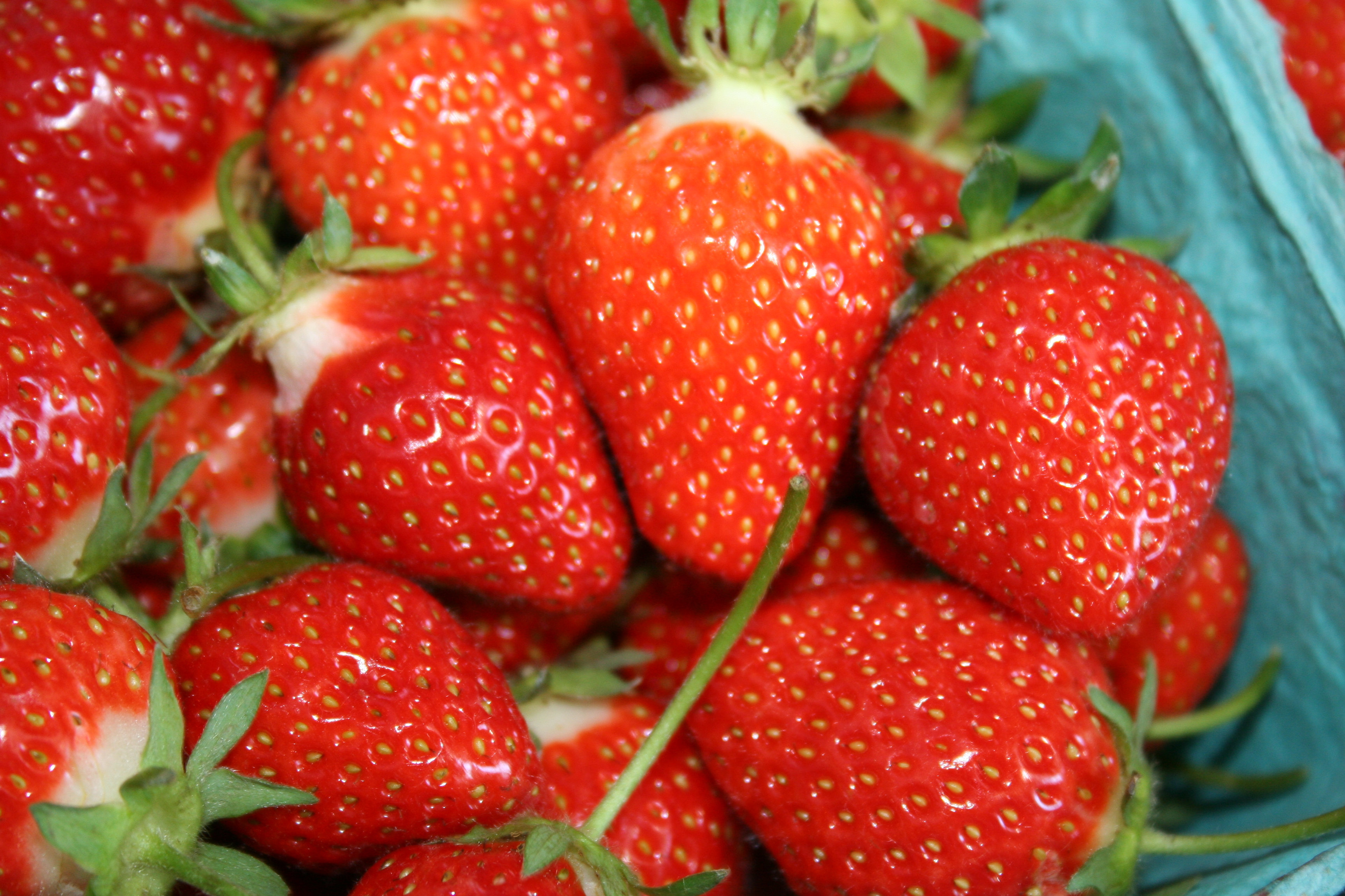 Strawberries after picked